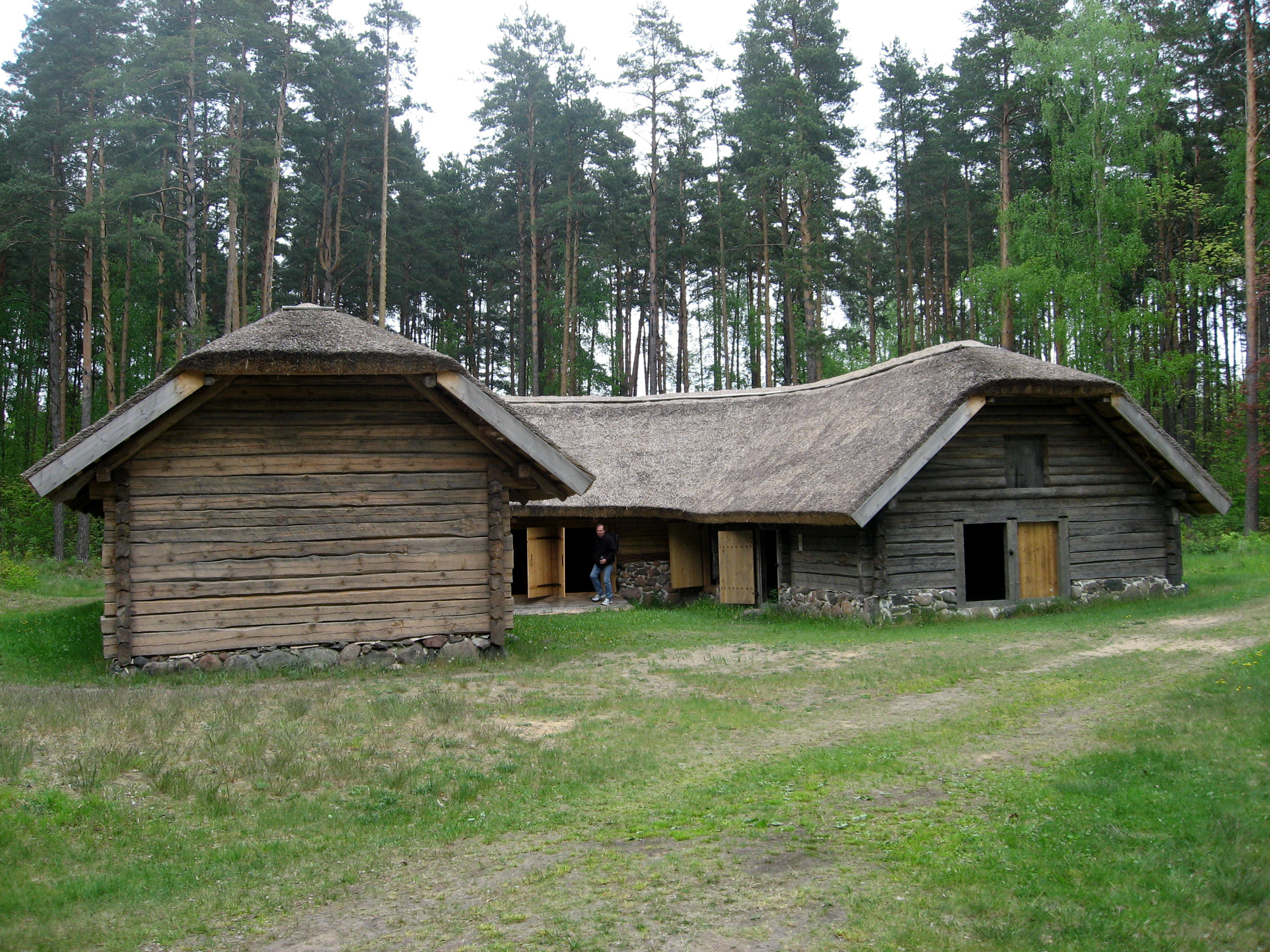 Lotyšské etnografické muzeum v přírodě: Hospodářské stavení (obsahuje chlévy, zásobárny, stodoly), oblast Zemgale, Sīpele, "Poķi", postaveno okolo roku 1780